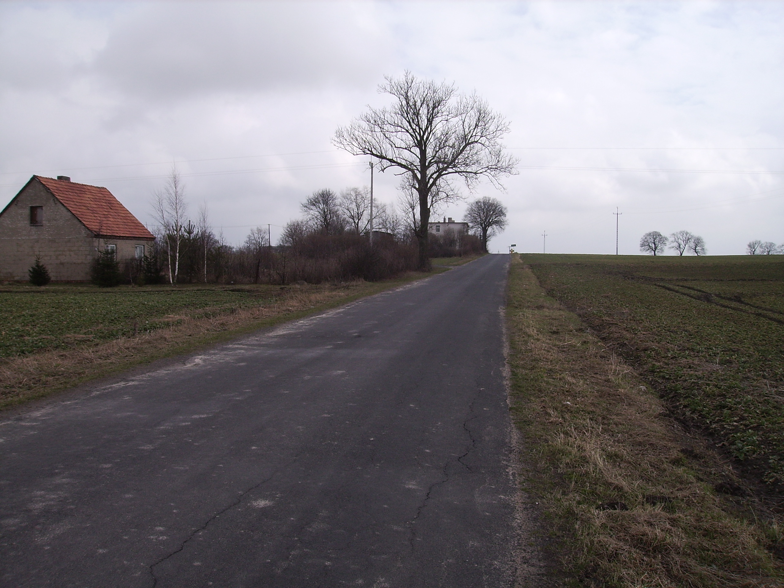 Początki Niemczyka